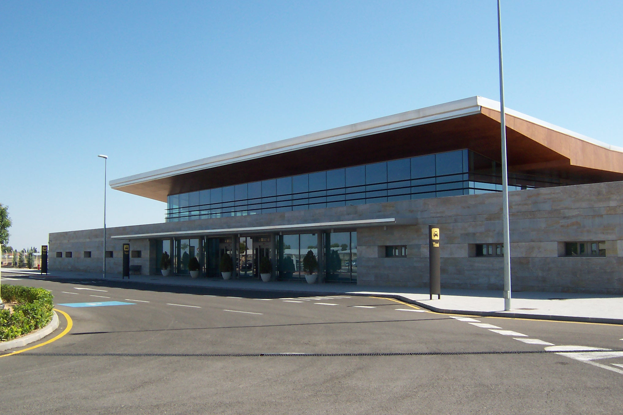 Vista exterior de la terminal del Aeropuerto de Los Llanos (Albacete).